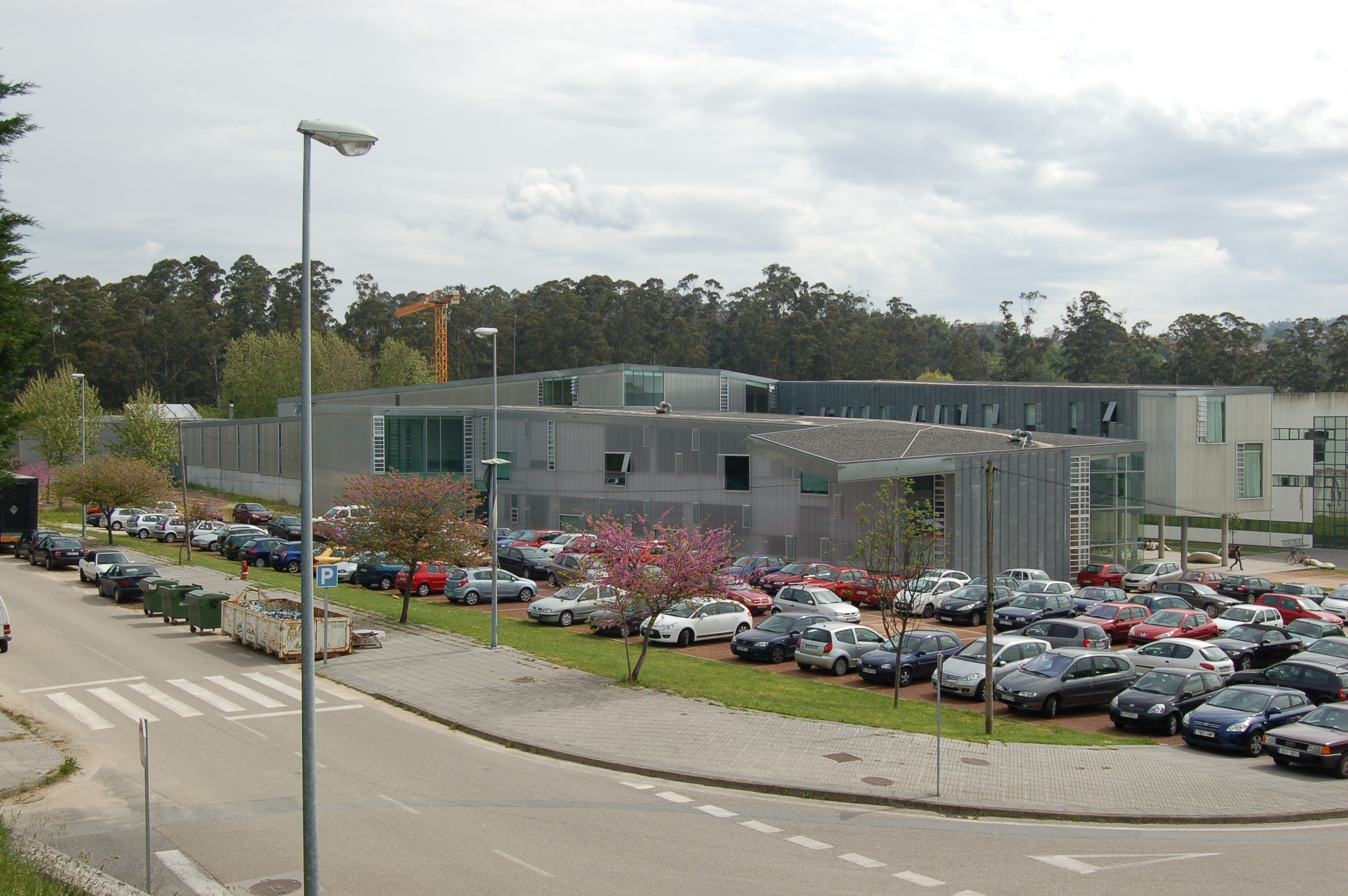 Facultade de Educación e Ciencias do Deporte de Pontevedra